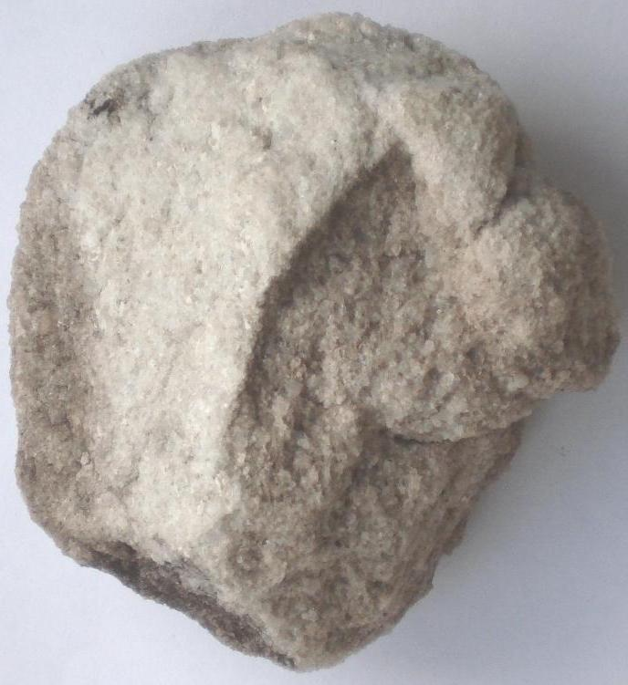 Tafelberg-Sandstein